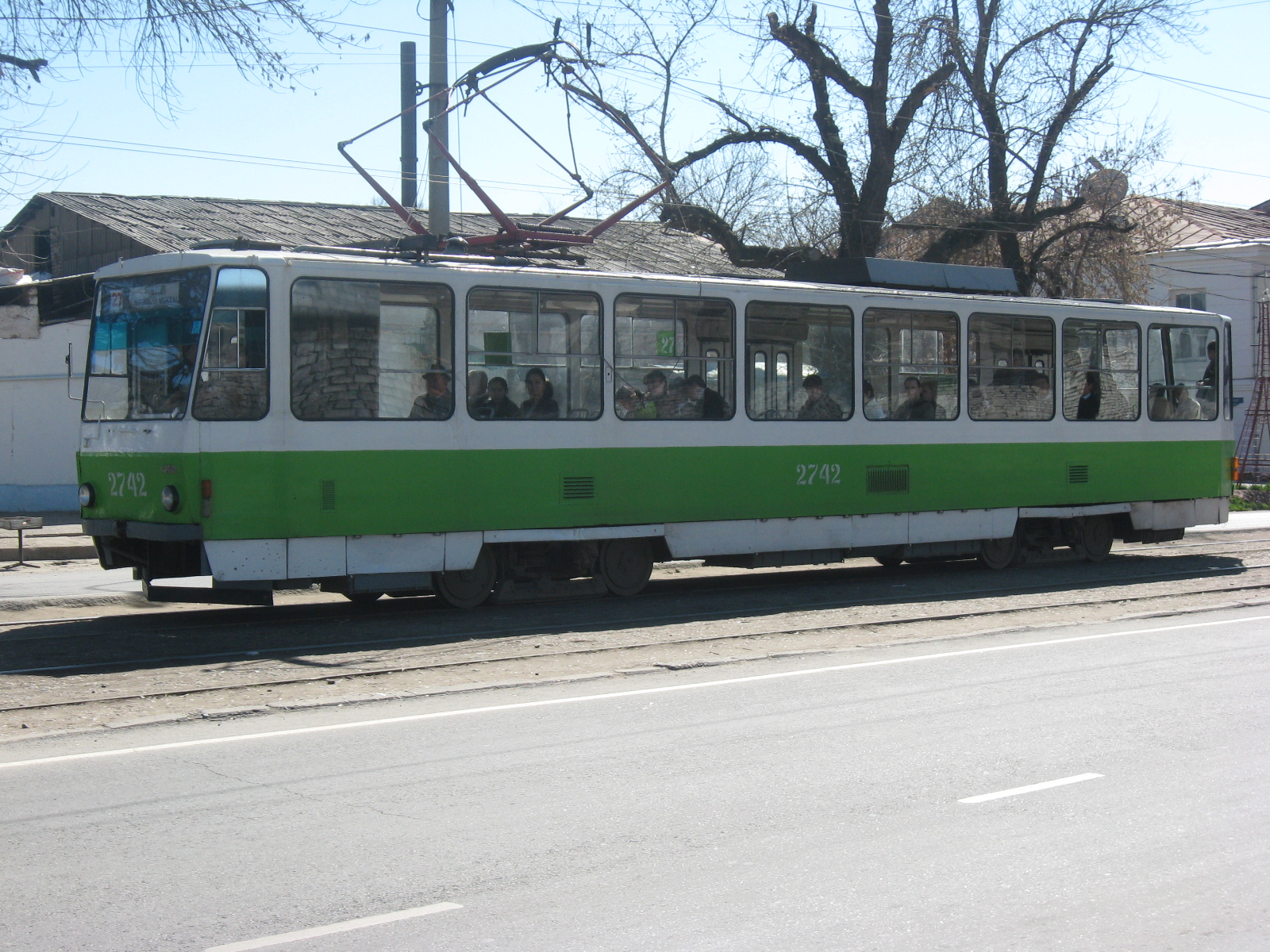 вагон Т6В5 (бортовой номер 2742, работает на 27 маршруте) на ул. Шайхантаур в Ташкенте